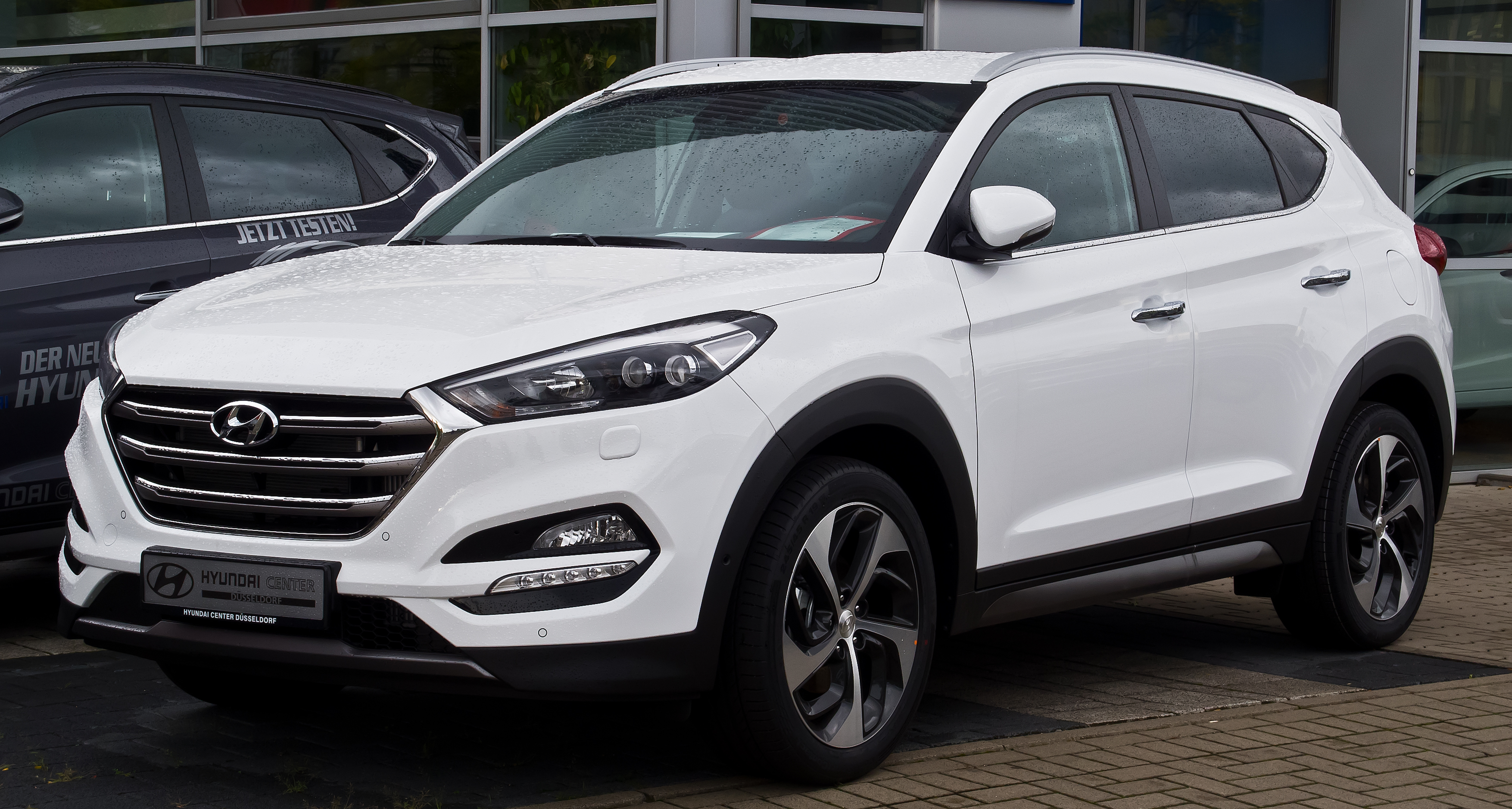 Hyundai Tucson 2.0 CRDi 4WD Premium (III)